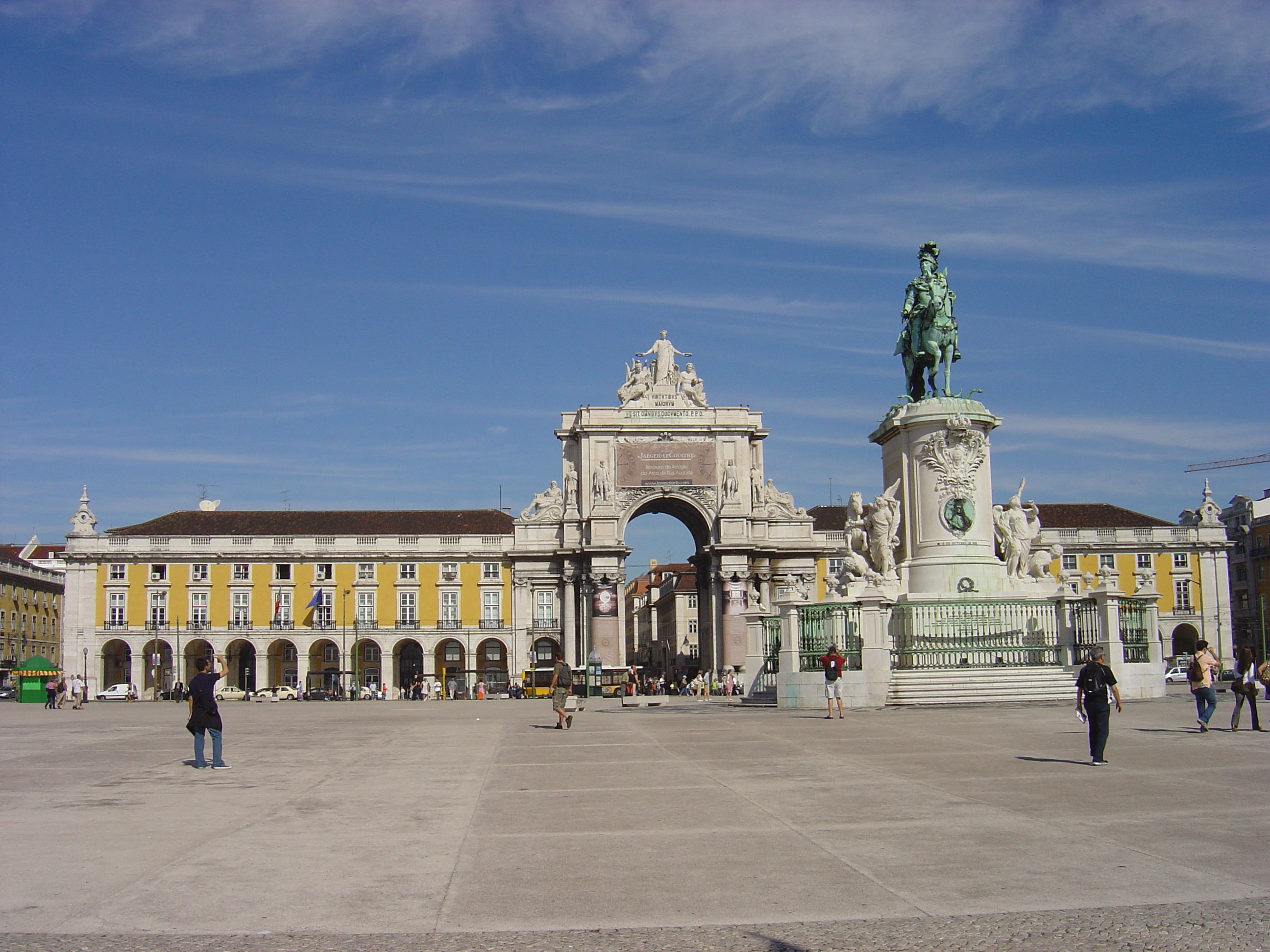 Terreiro do Paço (Praça do Comércio), Lisbon, Portugal